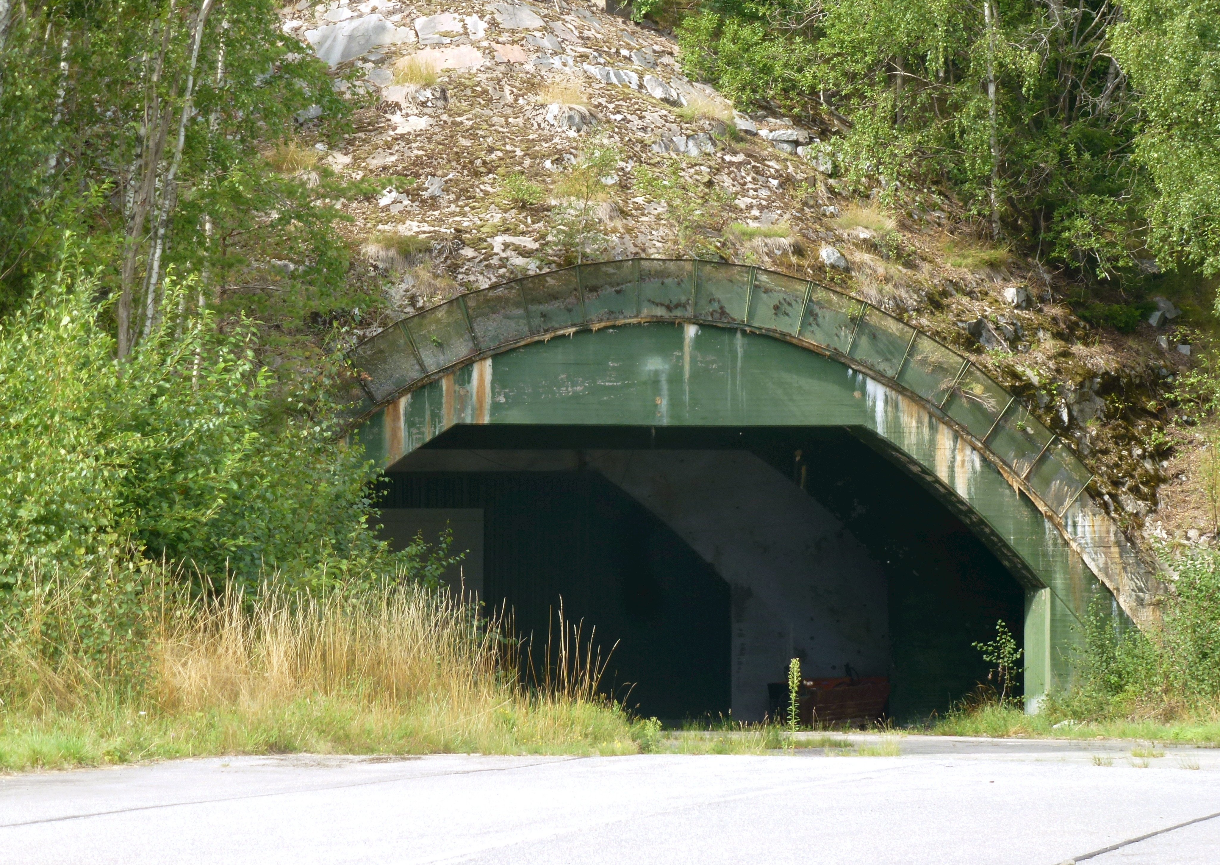 Barkarby flygfält 2013 entre till berghangar